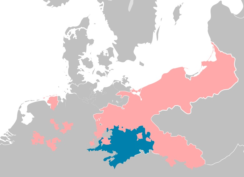 Preußen und Sachsen 1789, die Ursprungskarte Map Holy Roman Empire 1789.svg wurde modifiziert, indem nicht erwünschte Grenzverläufe gelöscht wurden und eine individuelle Farbgebung der eingezeichneten Objekte vorgenommen wurde.